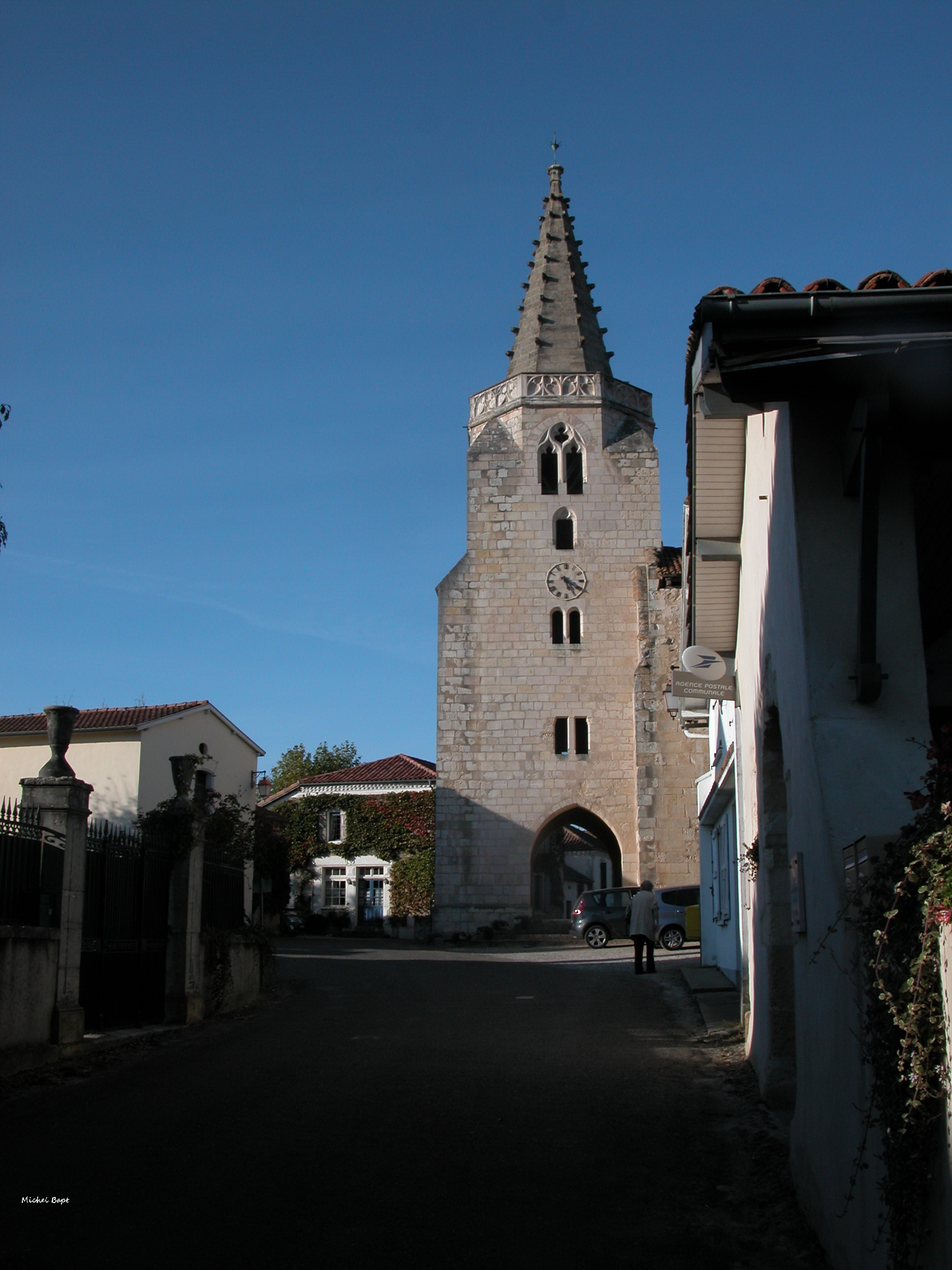 église Saint-Saturnin .